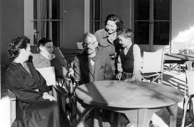 נחום וילבוש' עם אשתו שושנה (דודתי9 בעת סוף שבוע בקליה על שפת ים המלח, הוזמנתי להצטרף. מימין תיאו בנה של פולה קמינר. 1946 - תמר אשל